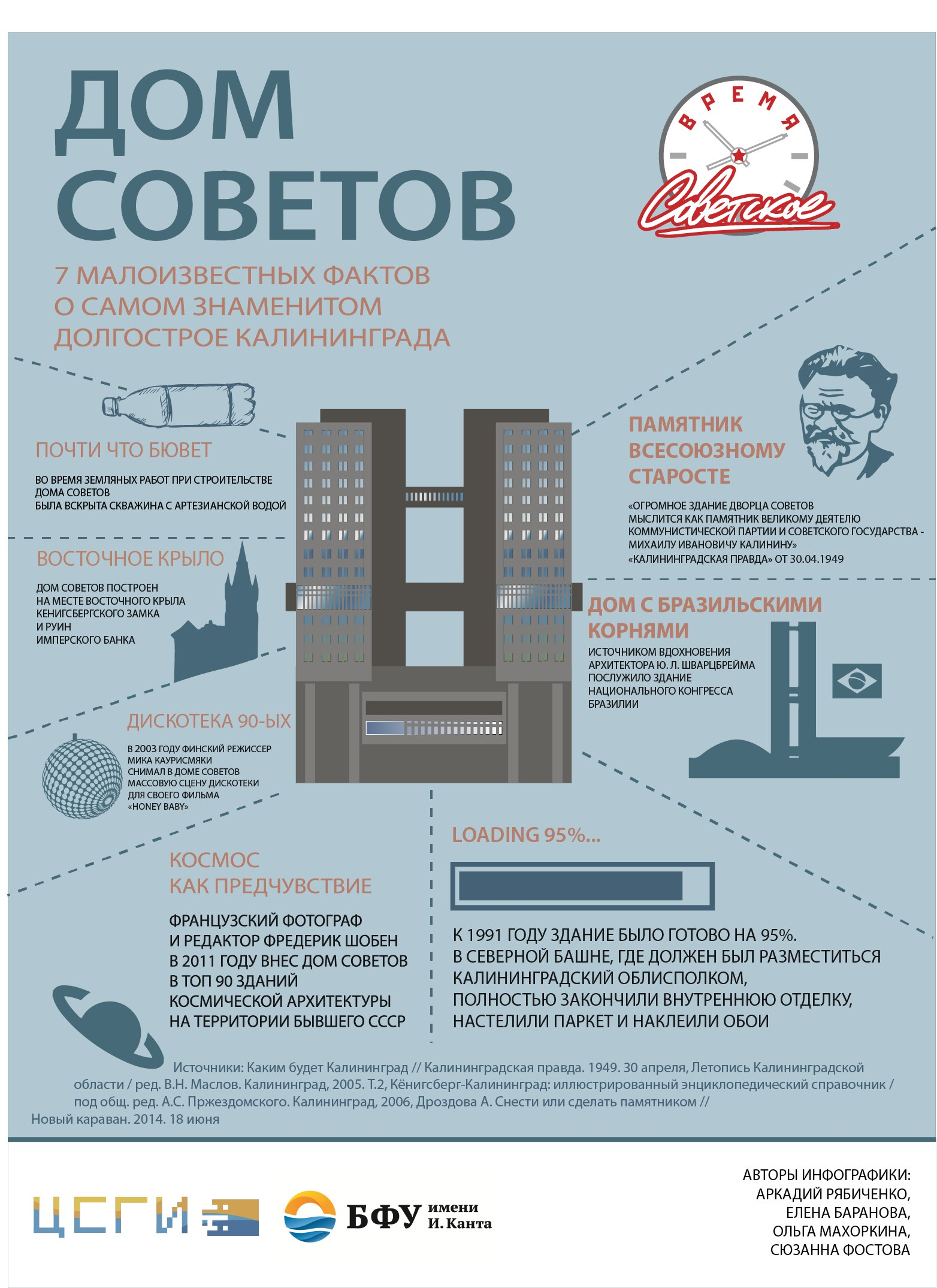 "Дом Советов. 7 малоизвестных фактов о самом известном долгострое Калининграда". Инфографика БФУ им. И.Канта